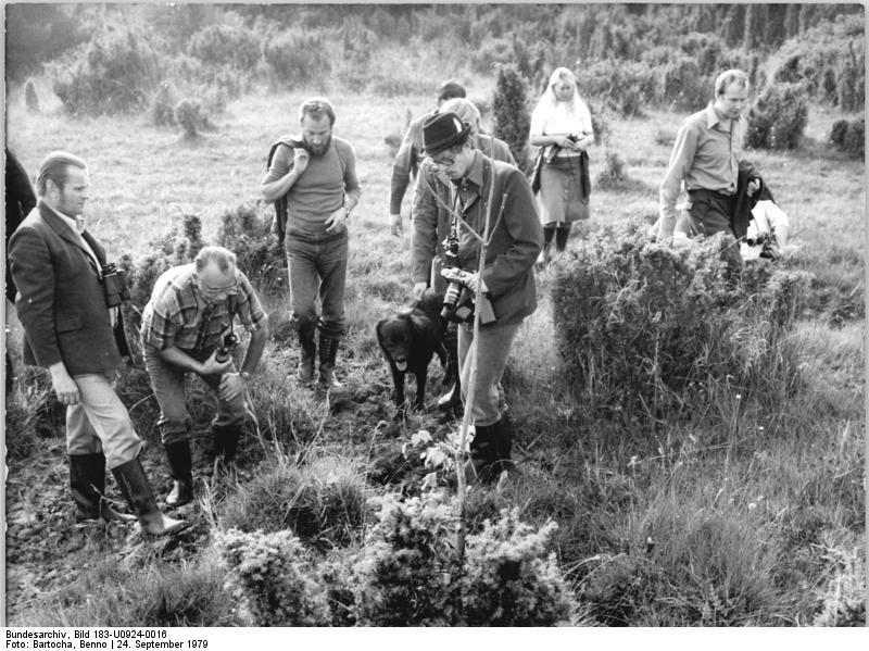 Müritzhof, Seminar für Naturschutzhelfer ADN-ZB Bartocha 24.9.1979-Neubrandenburg: Das seit 30 Jahren naturgeschützte Gebiet am Ostufer der Müritz ist mit über 4800 (4 800) ha das größte und beudeutendste Resrvat unserer Republik. Durch Exkursionen und Seminare mach sich an der dortigen Lehrstätte für Naturschutz Müritzhof ehrenamtliche Naturschutzhelfer aus allen Teilen der Republik mit den Aufgaben der Landeskultur und des Naturschutzes vertraut.